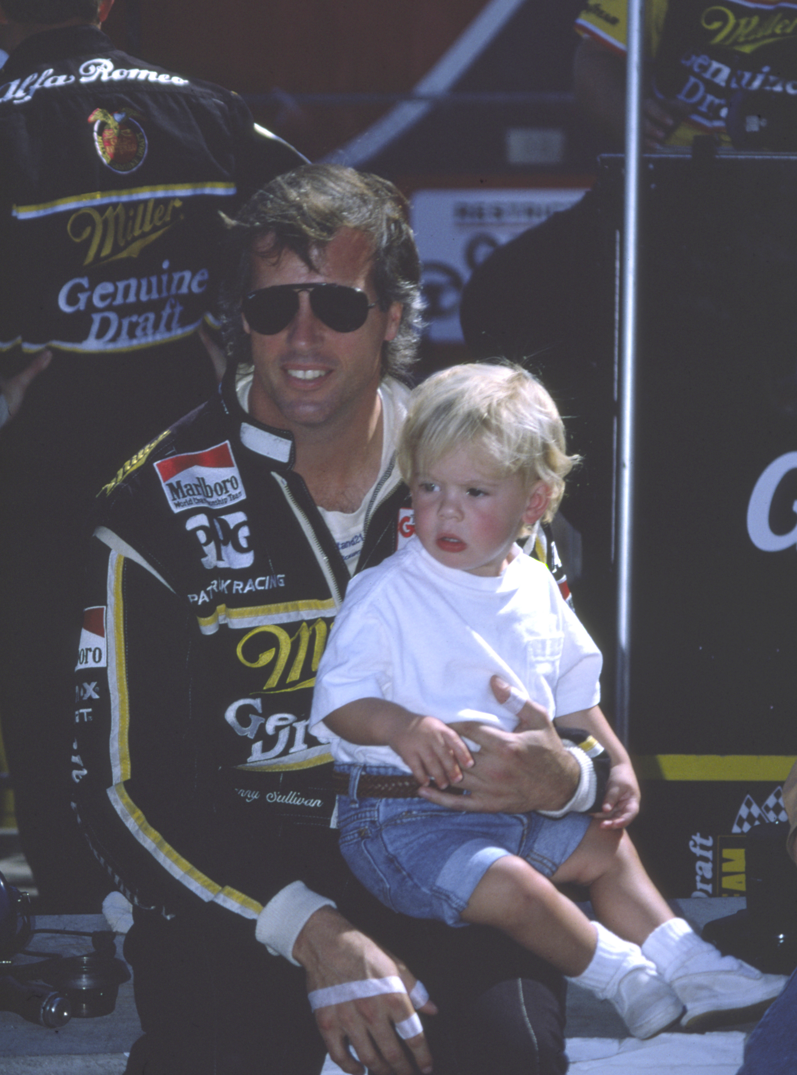 1991 CART Race - Laguna Seca - October 1991